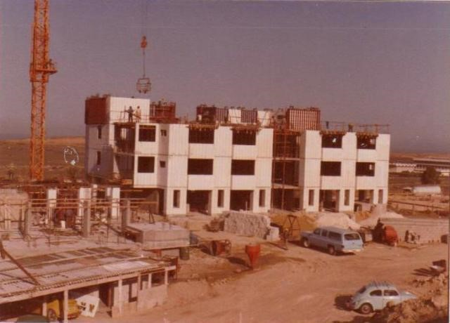 כך הכל התחיל - פרויקט ראשון בשיטת ברנוביץ - רמת אביב ג שנת 1982